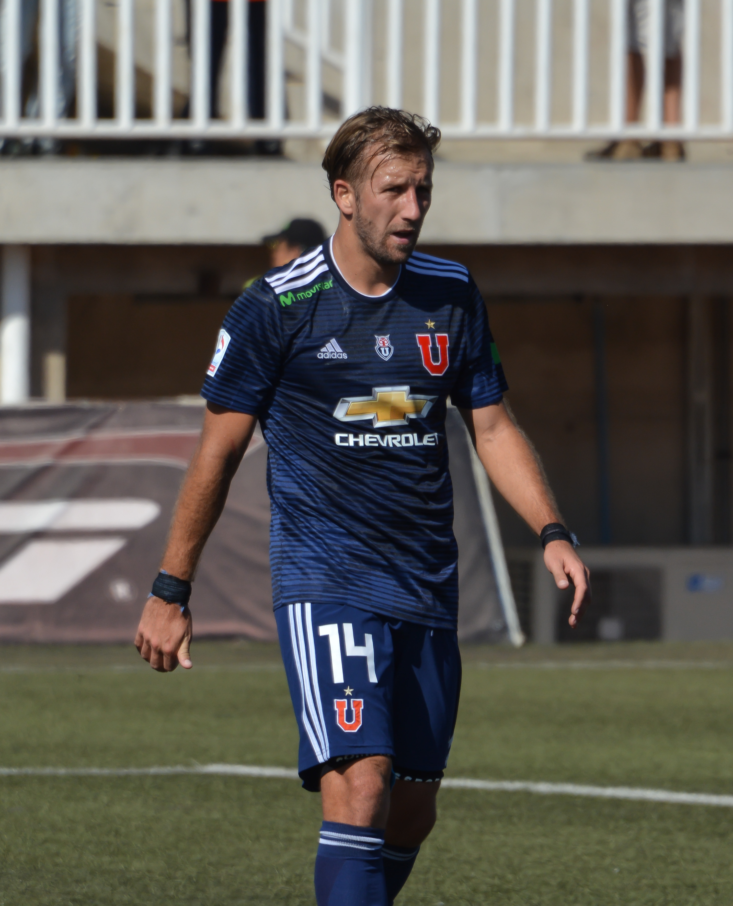 Unión La Calera v Universidad de Chile, Estadio Municipal Lucio Fariña Fernández, Quillota, Chile.